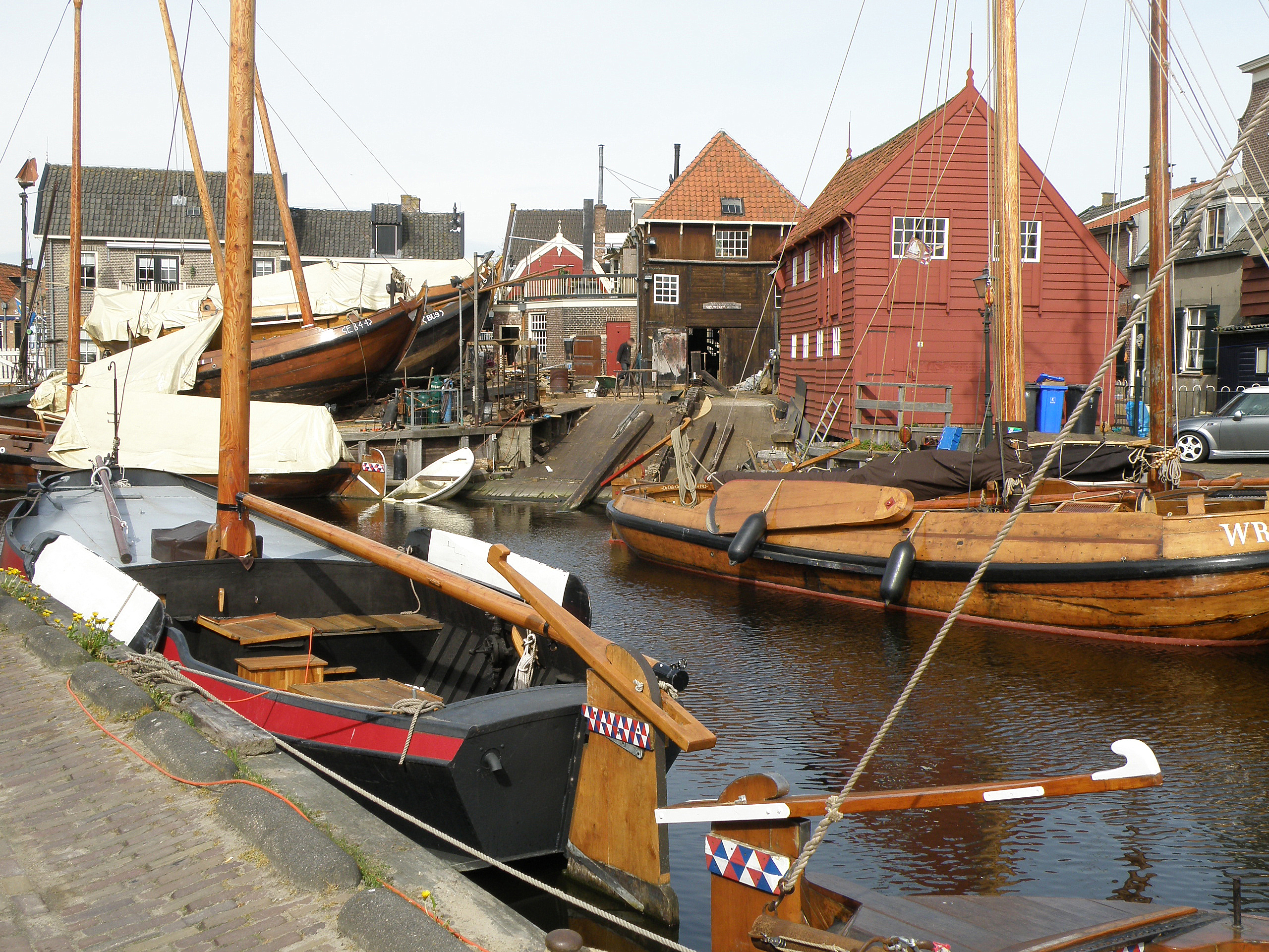 Spakenburg, gemeente Bunschoten (prov. Utrecht, Nederland). De Oude Haven, met zicht op de Botterwerf.